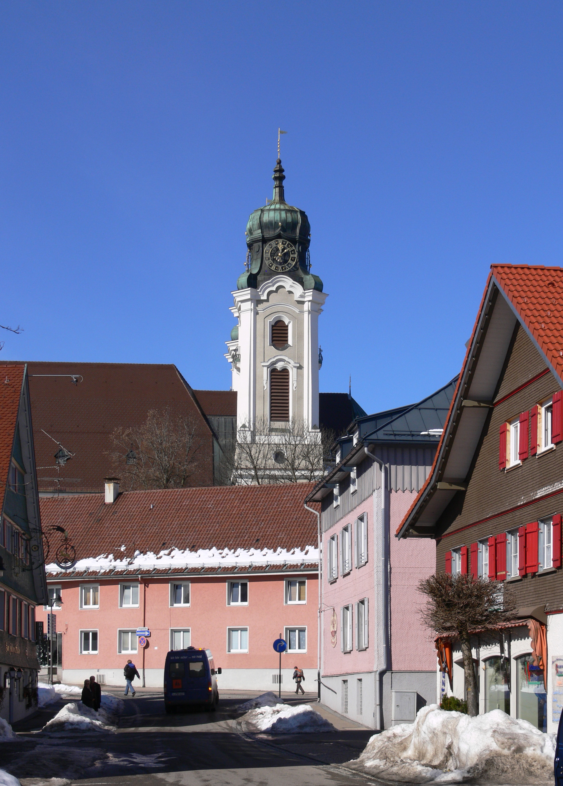 Lindenberg im Allgäu, Katholische Stadtpfarrkirche St. Petrus und Paulus